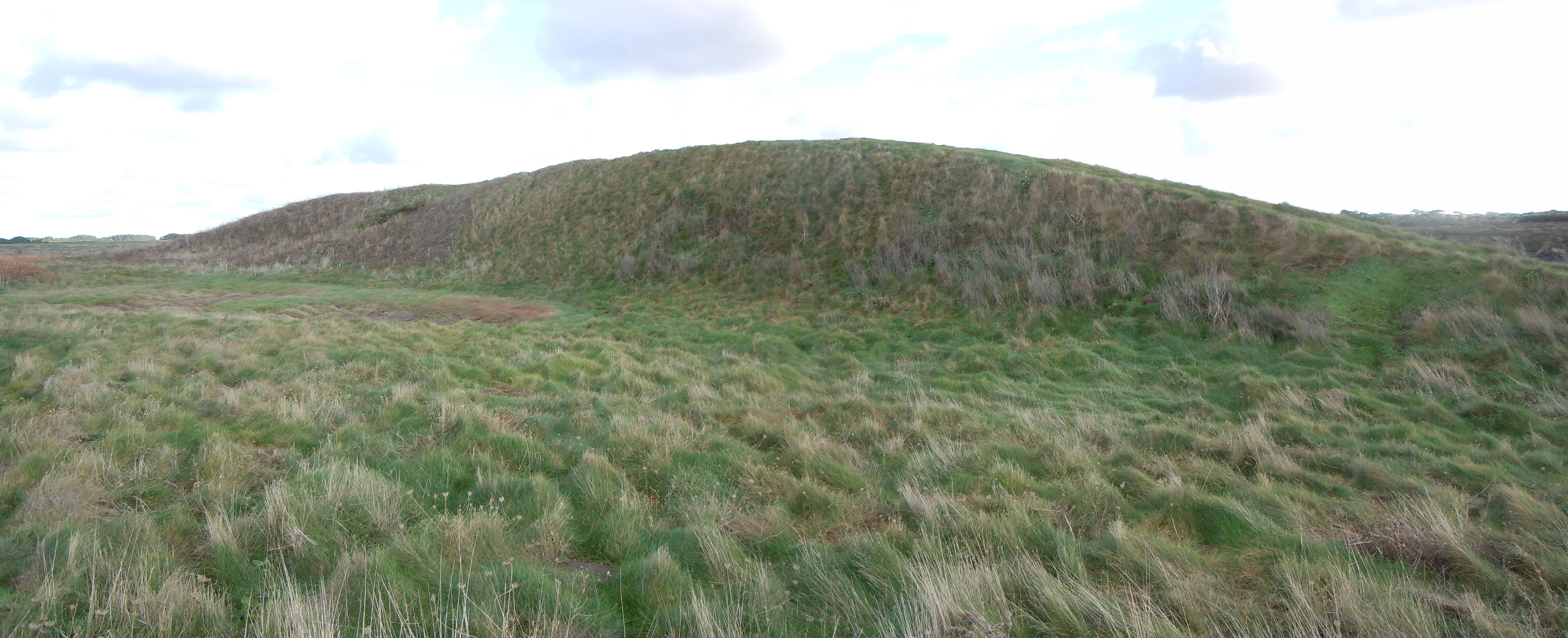 Talus du Camp de César à l'entrée de la presqu-île de Koh-Kastell